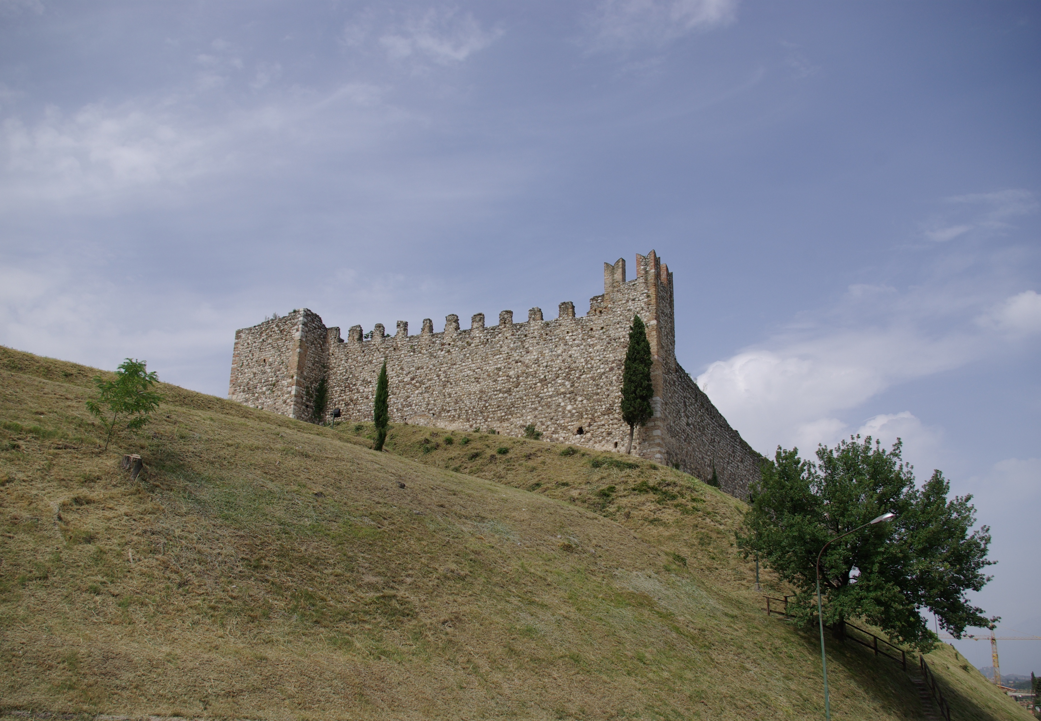 Das Kastell in Padenghe sul Garda